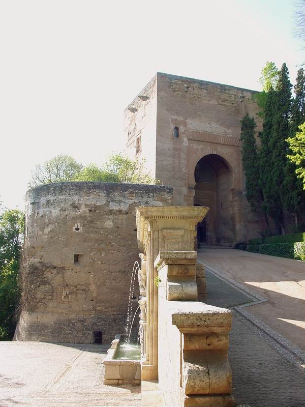 Granada Alhambra eigenes Foto 2004 public domain Mewes 08:15, 5. Mär 2005 (CET) Gerechtigkeitstor